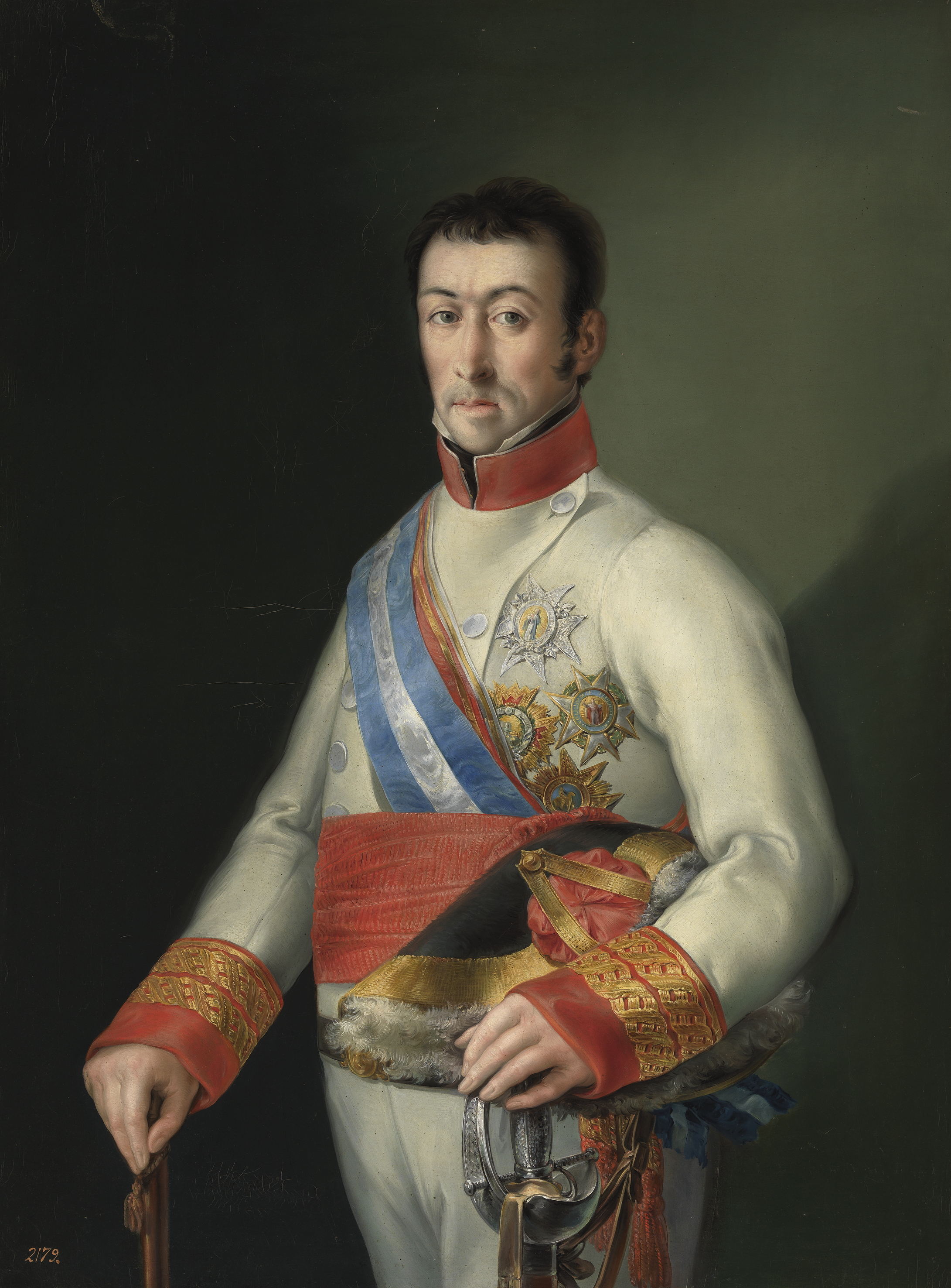 Retrato del general español Francisco Javier de Elío (1767-1822).